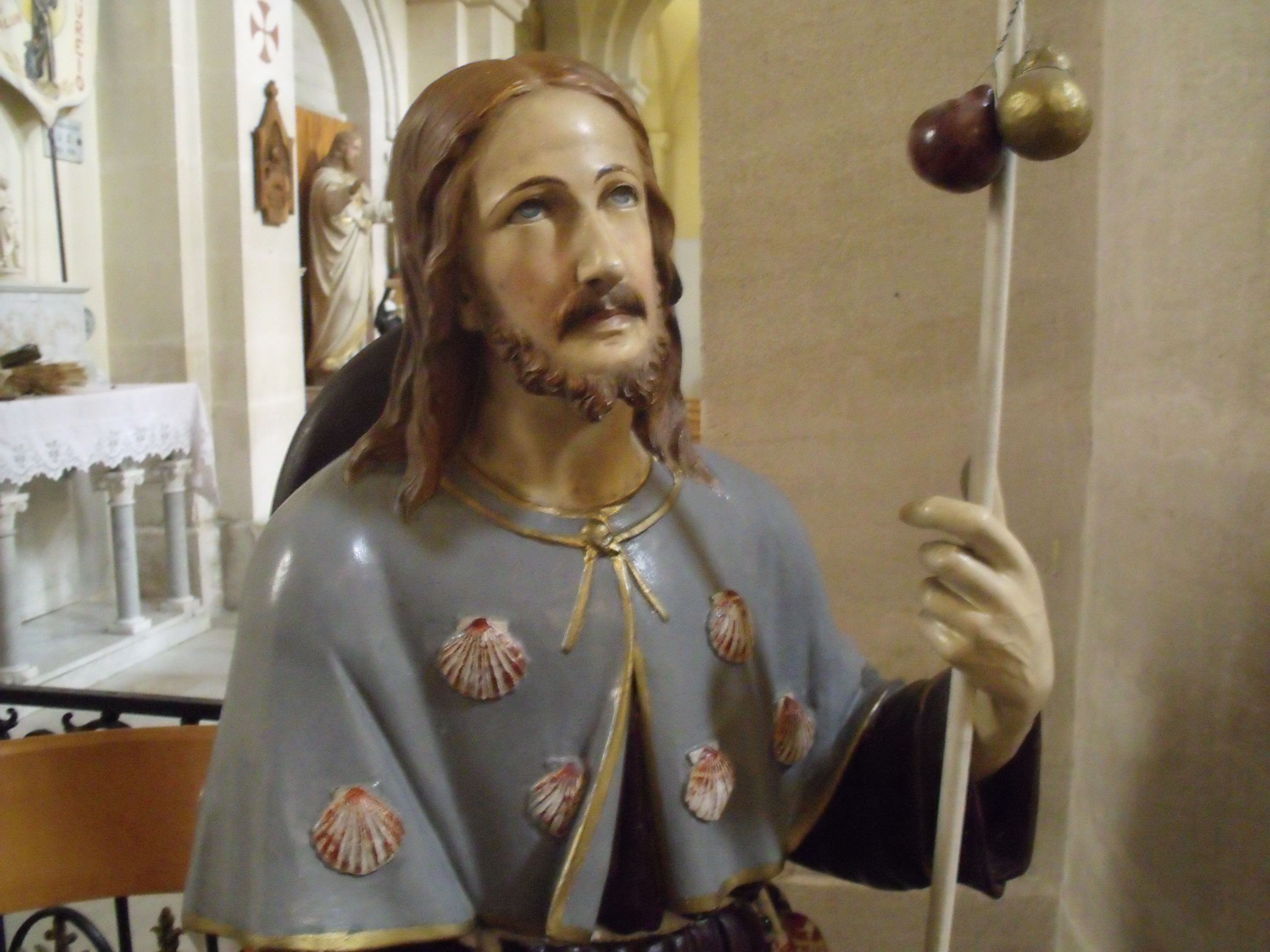 Statue de saint Roch. Église d'Aureille. Bouches-du-Rhône.